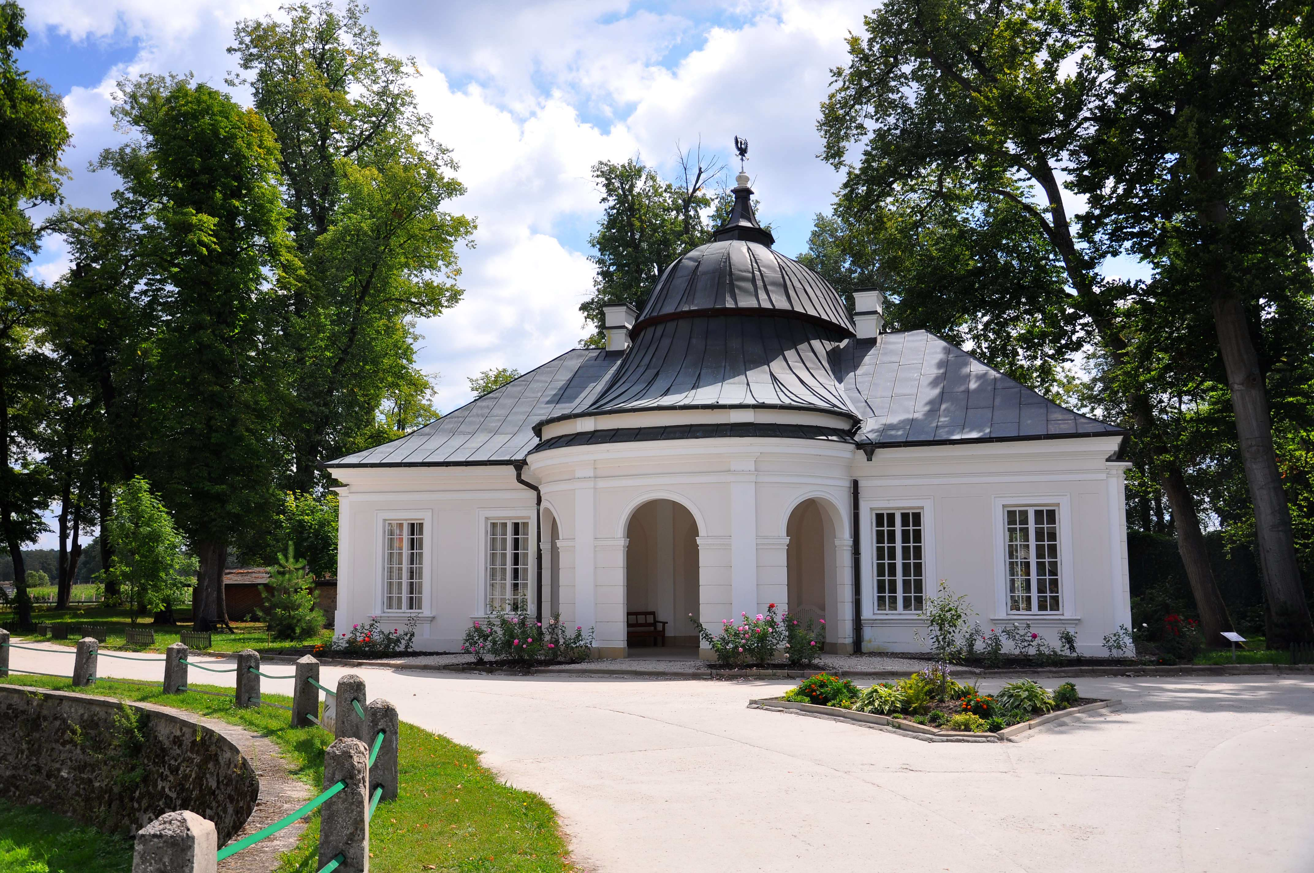 Kurozwęki - pawilon wschodni / herbaciarnia, obecnie pełni funkcje hotelowe, 1770